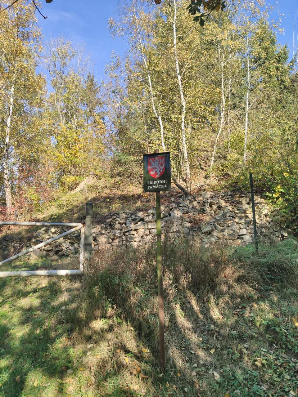 Pohled na hranici přírodní památky Opukový lom u Přední Kopaniny z jihozápadní strany.